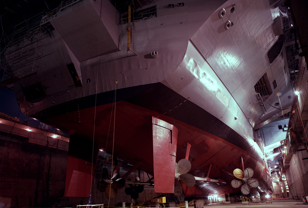 Der Flugzeugträger USS Nimitz (CVN-68) im Trockendock 12 der Werft von Newport News Shipbuilding während der Generalüberholung (Refueling and Complex Overhaul), die im Jahr 2001 abgeschlossen wurde. United States Navy